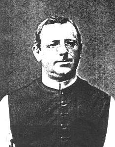 Rafael Michael Pavel (1842 - 1900), Český římskokatolický duchovní.